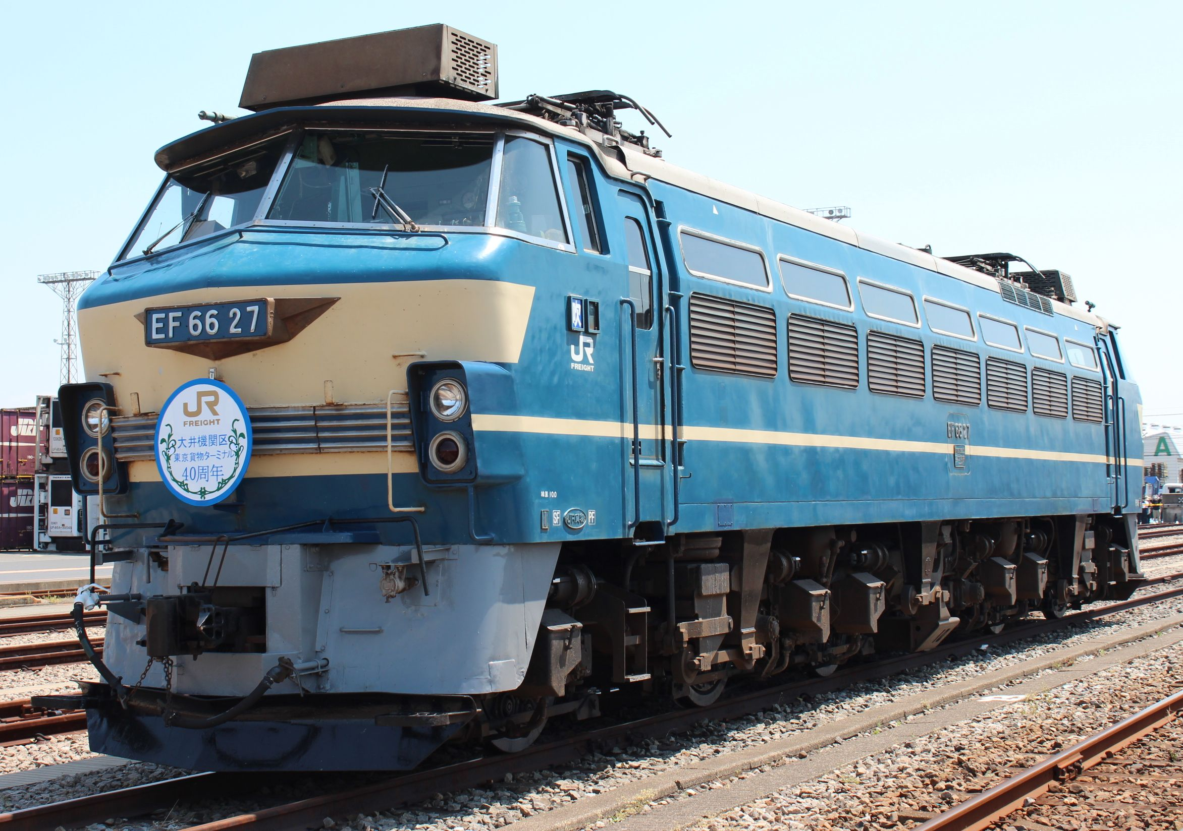 国鉄EF66形電気機関車